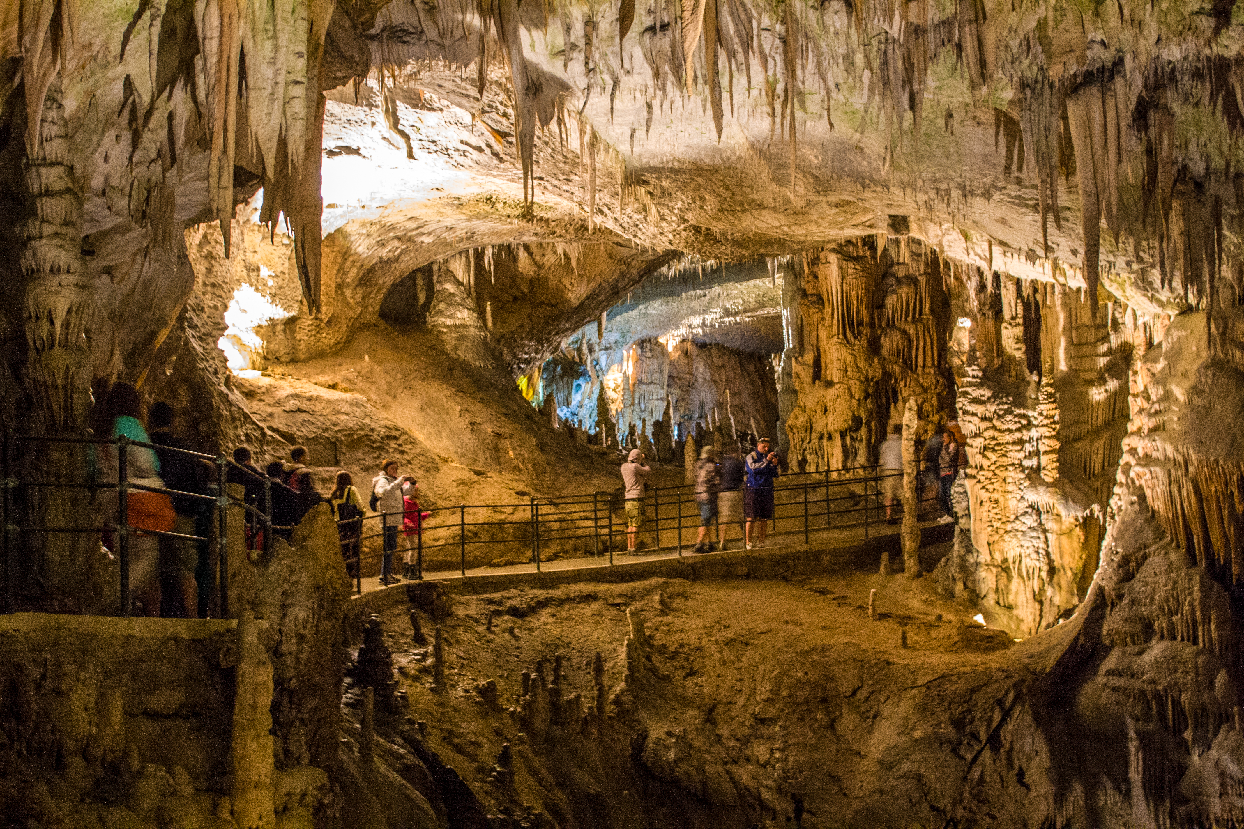 Postojna Cave